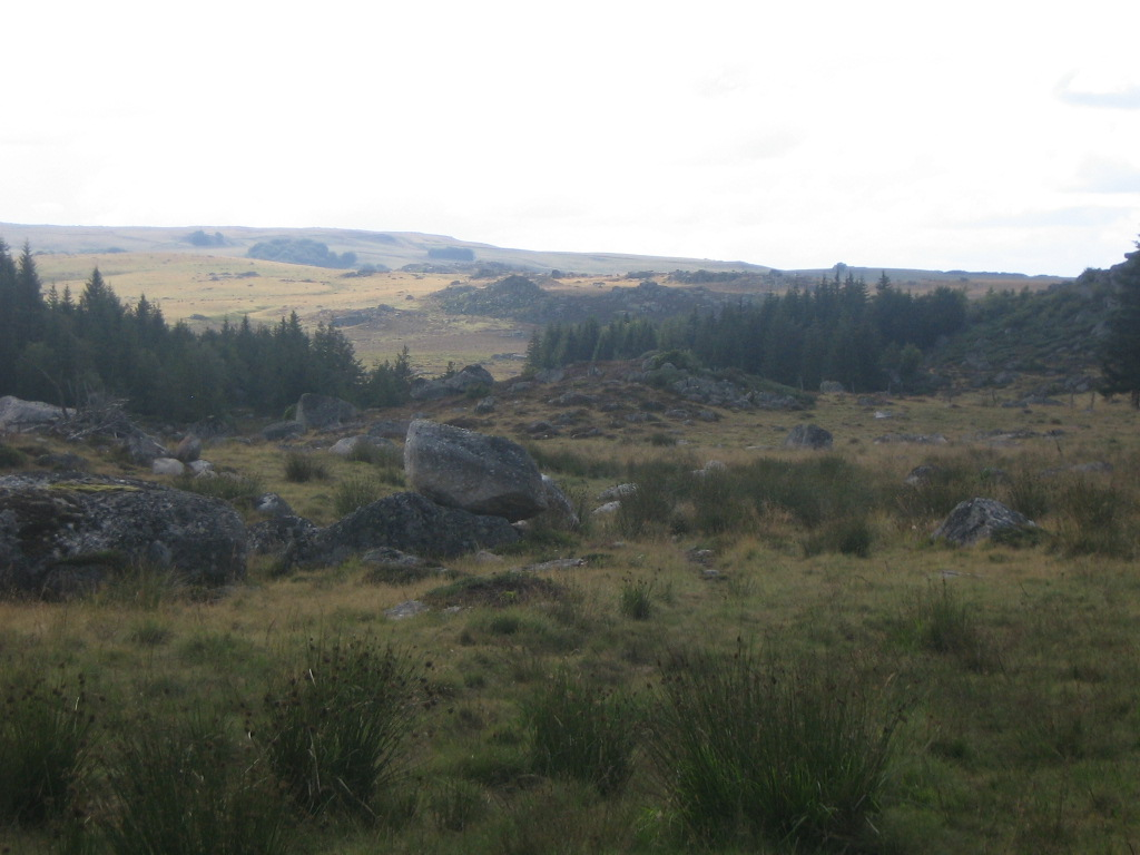 Aspect de la partie sud du plateau de l'Aubrac.